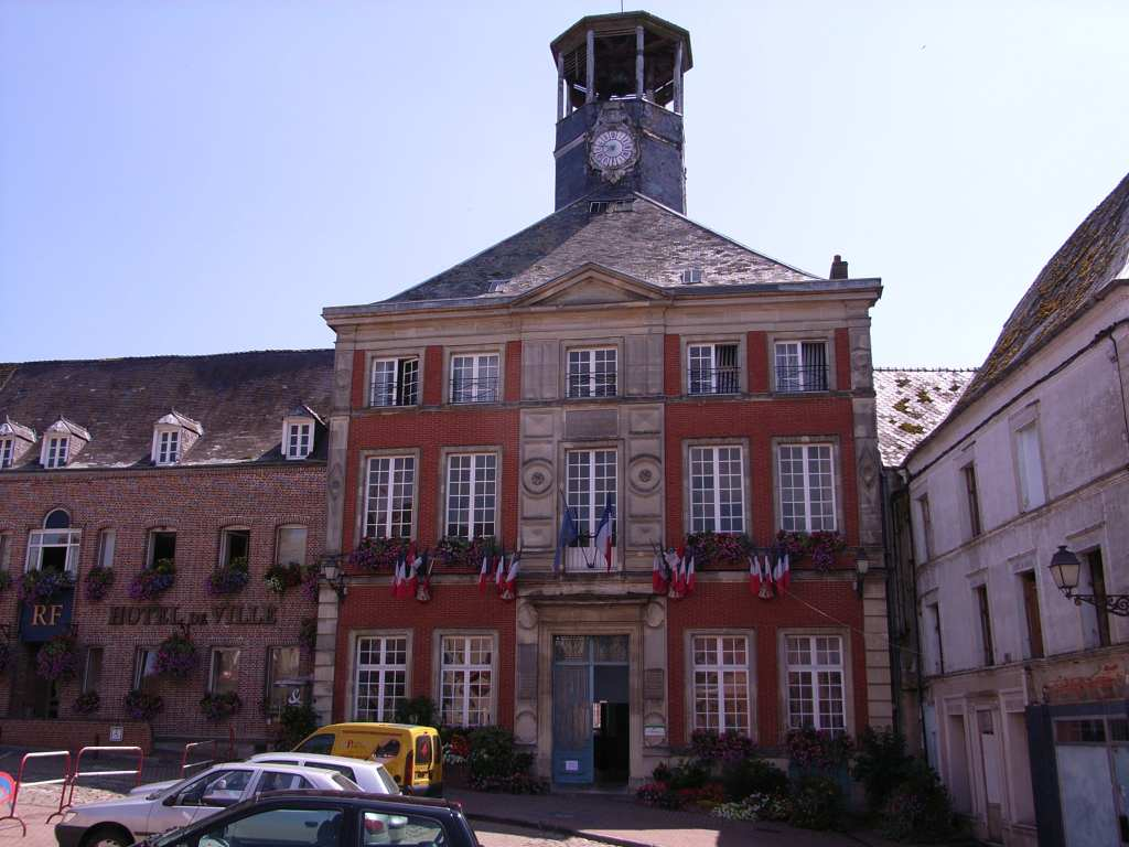 Vervins, Mairie